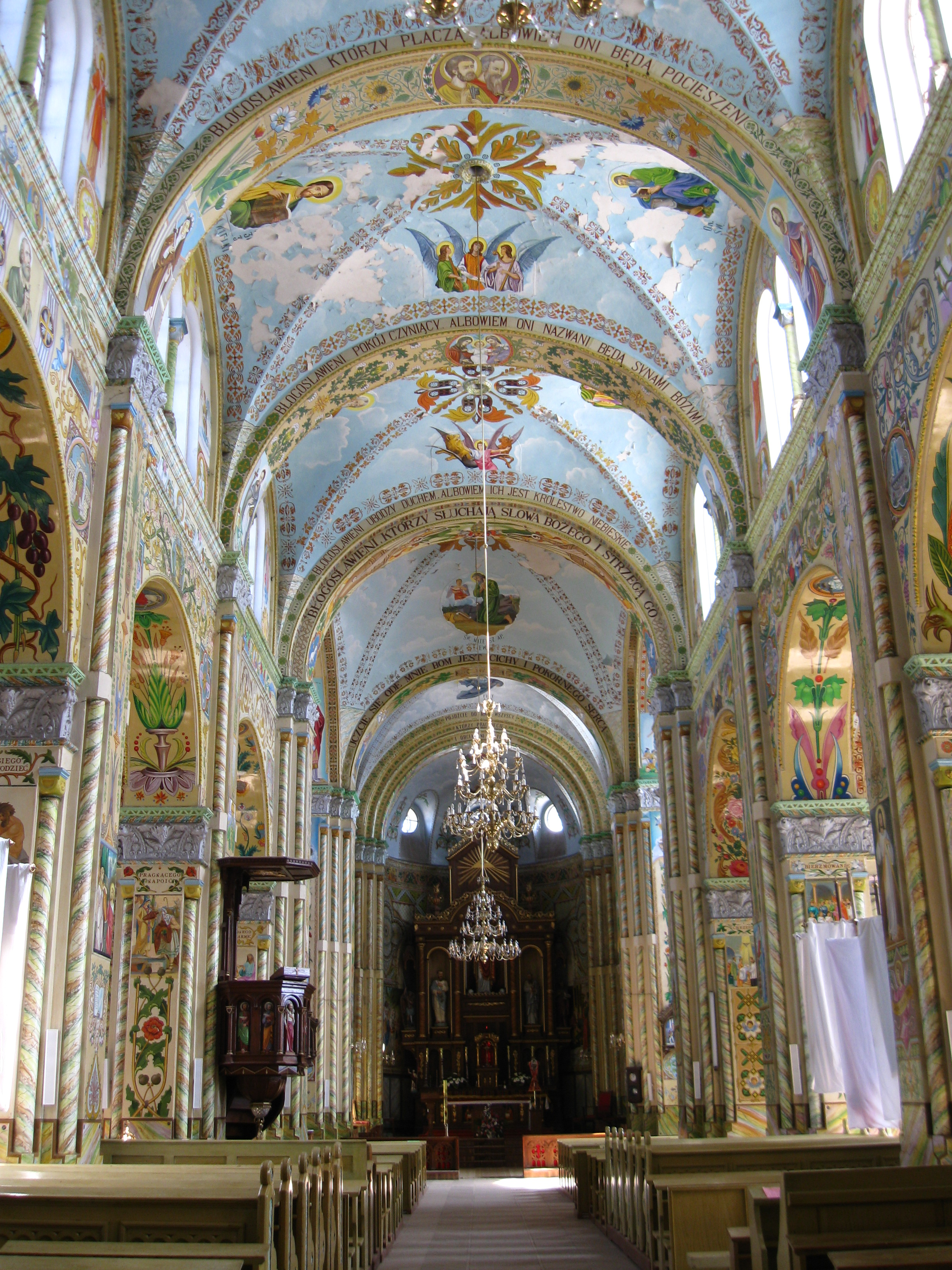 Беларуская (тарашкевіца): Касьцёл Сэрца Ісуса уваходныя дзверы. в. Слабодка This is a photo of Belarusian heritage monument. Reference number: 212Г000212 ( WLM)